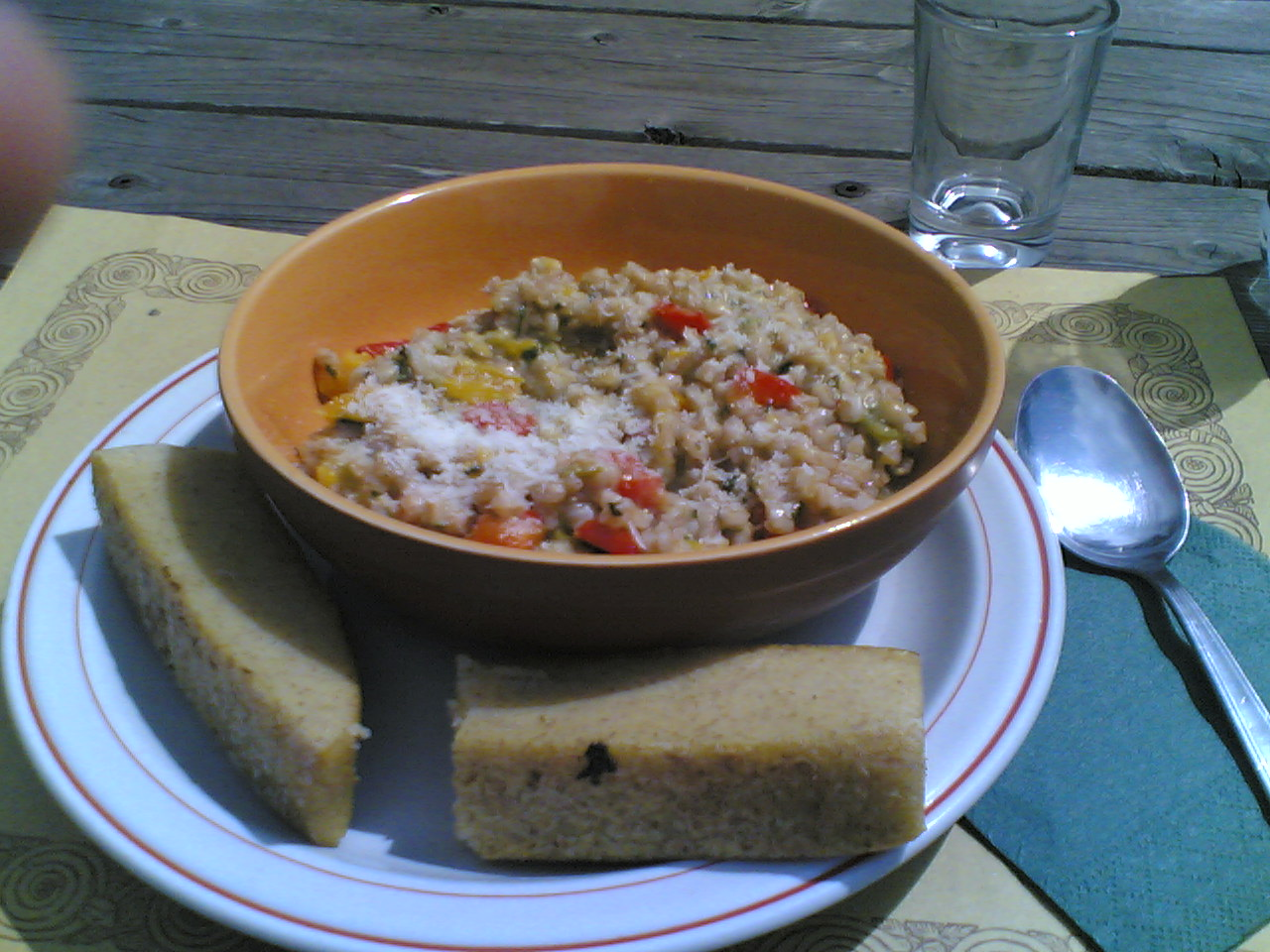 Ciotola di "orzotto" con verdure e due fette di polenta, preparato da Monica del Rifugio Bosconero